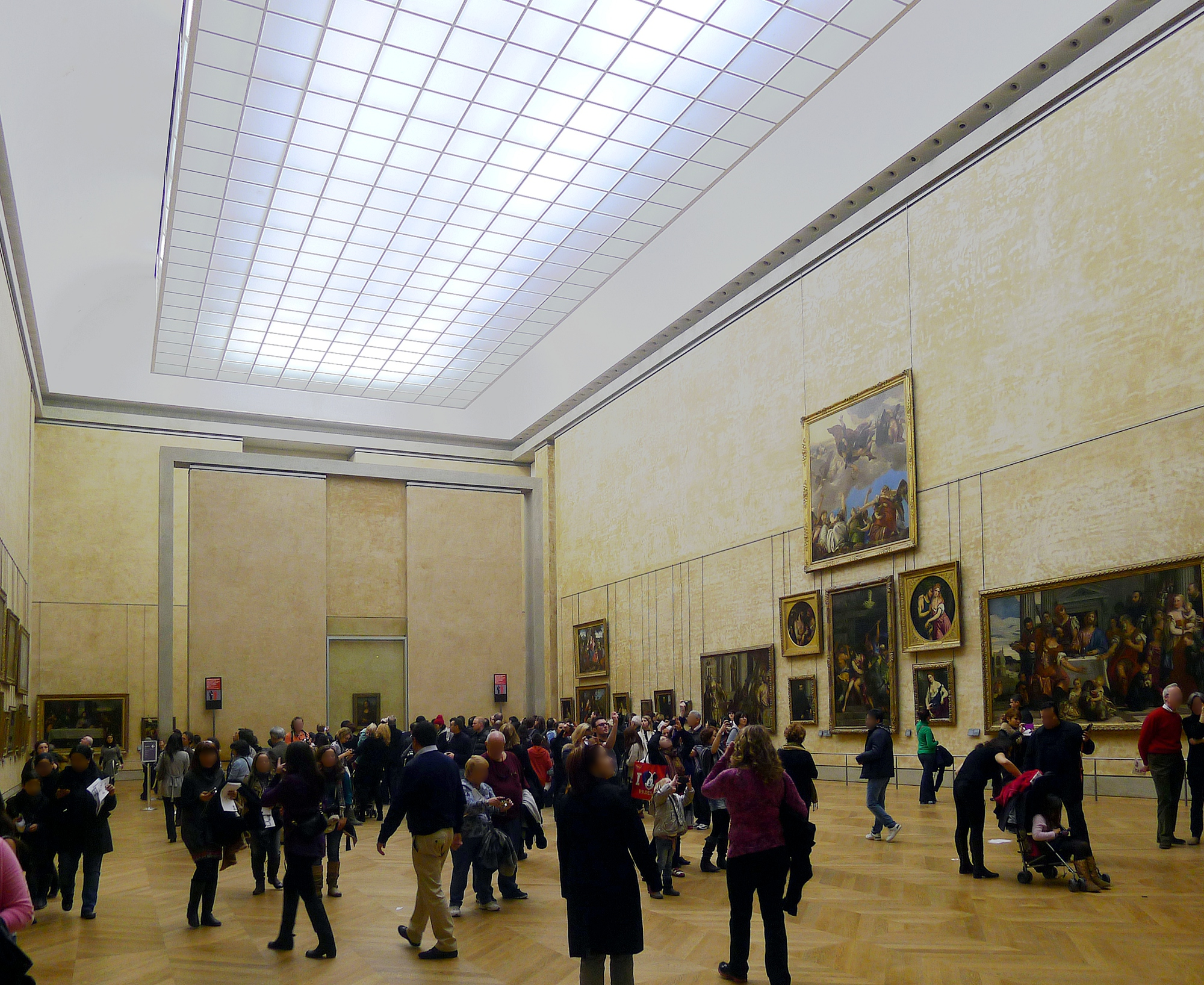 Louvre - salle Joconde